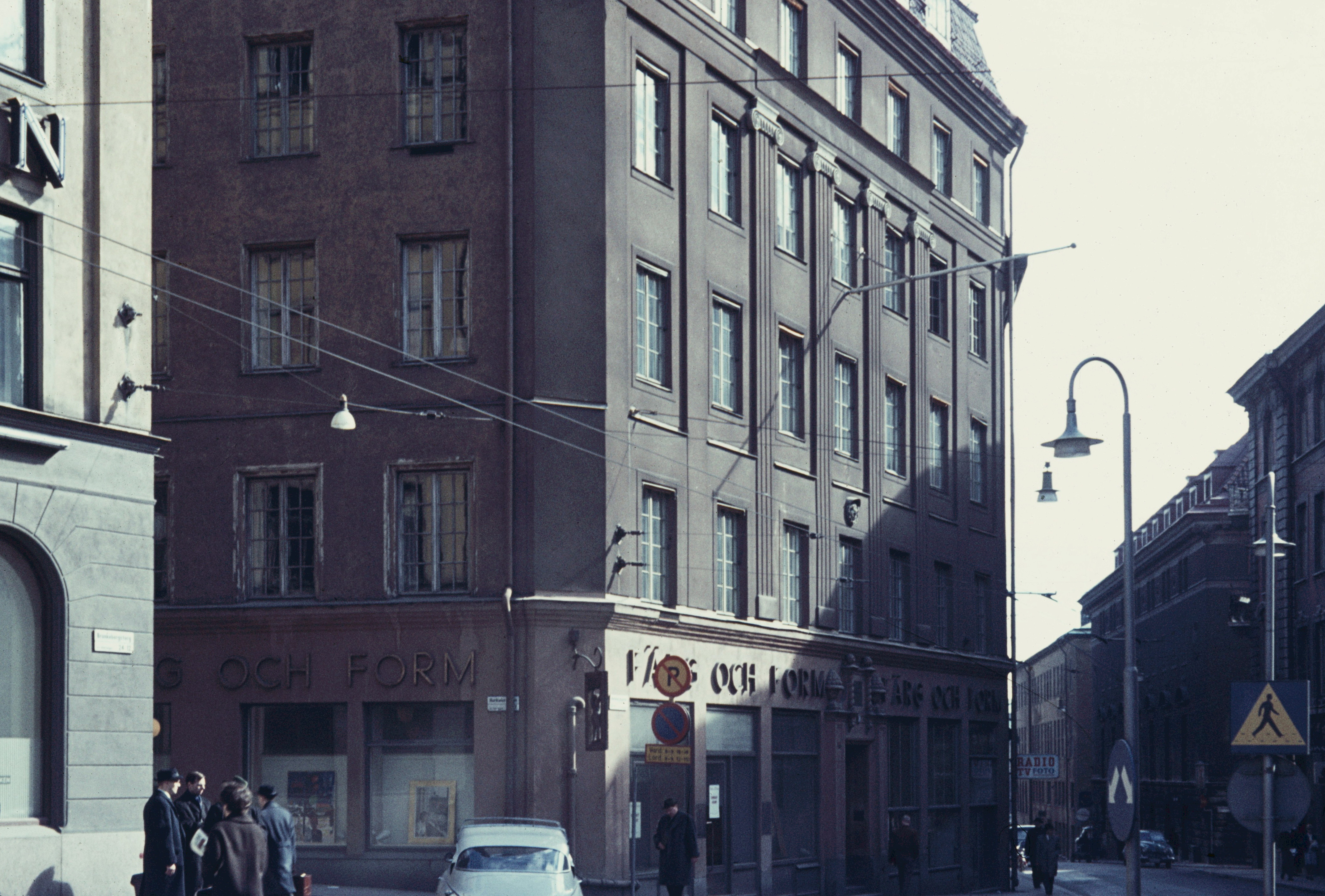 FOTOGRAFIMalmtorgsgatan 10, Herkulesgatan 7. Gatufasader. I huset är Färg och Forms konstgalleri inrymt. Till höger Malmtorgsgatan söderut. 1963-1963FOTOGRAF: Bohman, Gösta. BILDNUMMER: Dia 6067Stadsmuseet i Stockholm. Ursprungligen Hotel Kung Karl. Uppfört enlig J F Åboms ritningar. Fasader senare omdanade för Sveriges Industriförbund av Cyrillus Johansson